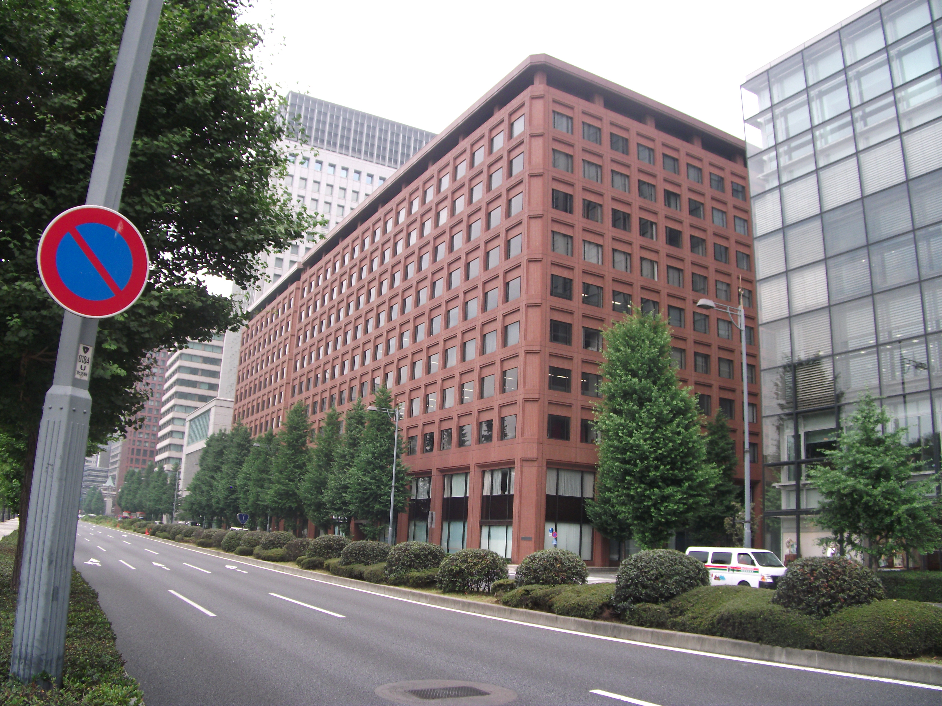 東京・丸の内、岸本ビルヂング